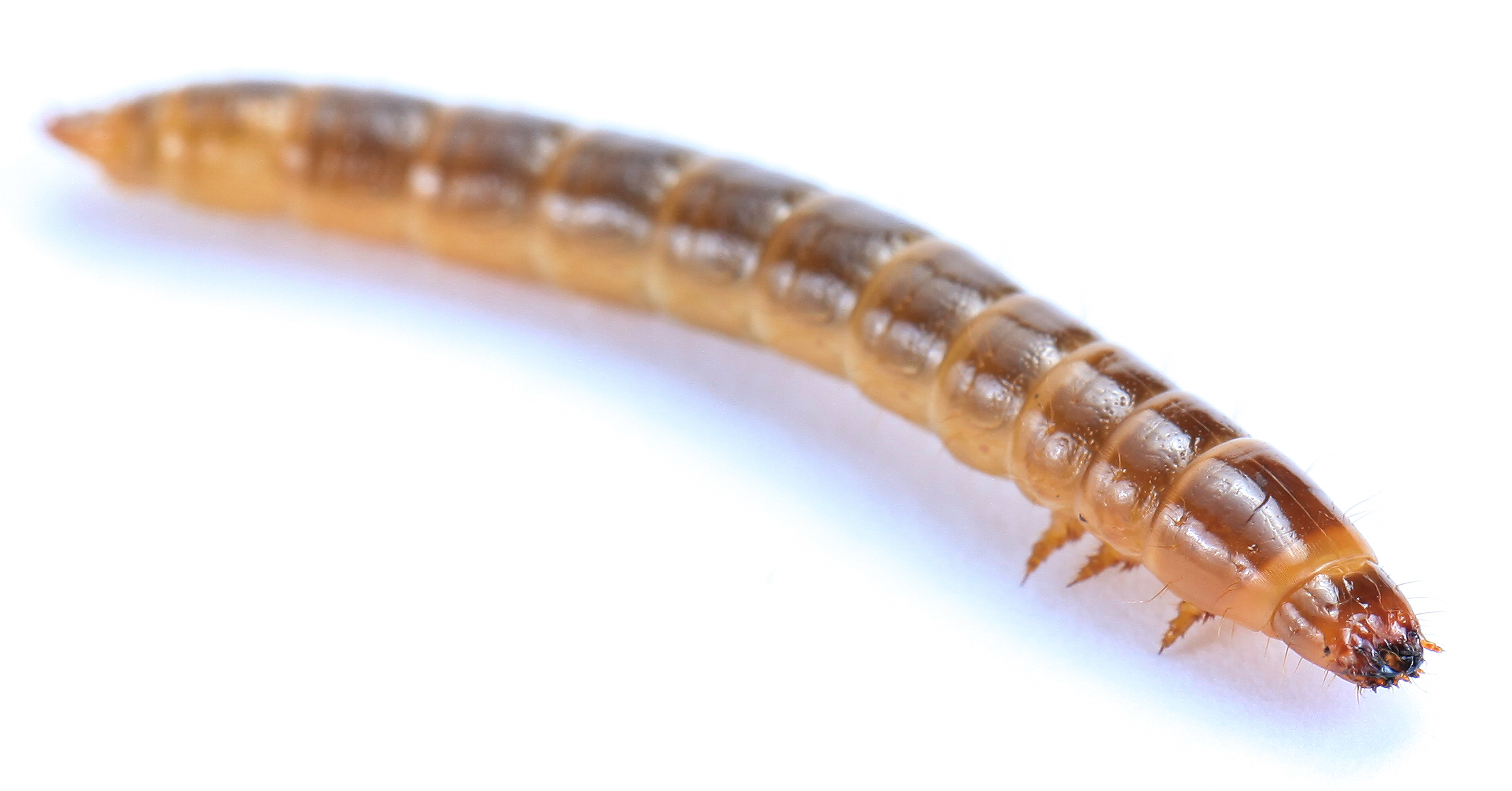 Drahtwurm - Nahaufnahme des Kopfes